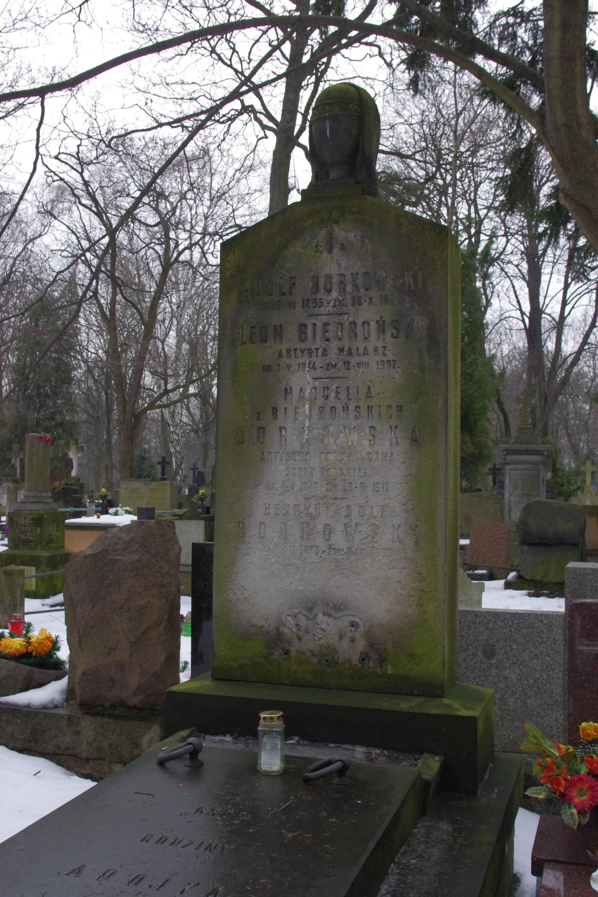 Grób artysty malarza Leona Biedrońskiego (1834-1907) i aktorki dramatycznej Marcelii Biedrońskiej (1848-1911) na Cmentarzu Powązkowskim w Warszawie